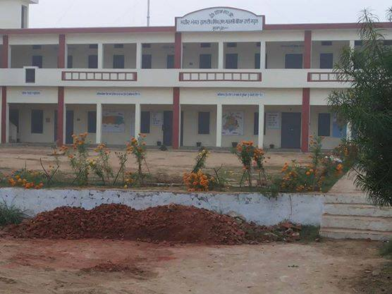 GOVERNMENT HIGH SCHOOL